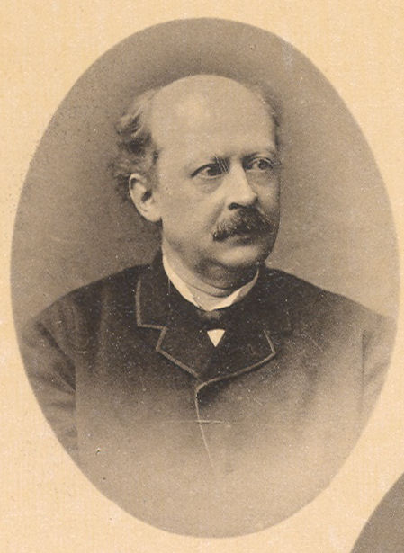 Marius Adrianus Brandts Buys sr.Deze foto is gepubliceerd in Henry Viotta's 'Onze Hedendaagsche Toonkunstenaars' uit 1893. Viotta is in 1933 overleden.